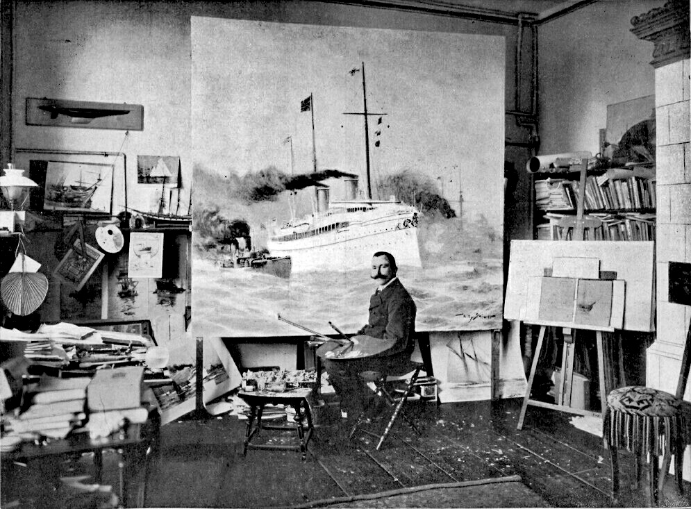 Der deutsche Marinemaler Willy Stöwer (1864-1931) in seinem Atelier, 1903.